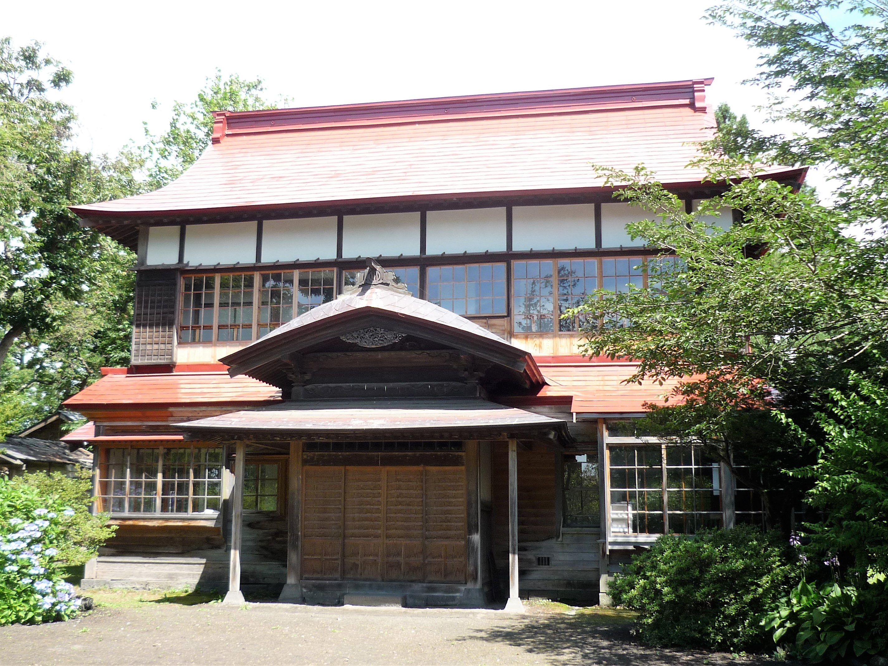 総合公園だて歴史の杜にある迎賓館 Panasonic Lumix DMC-FS3